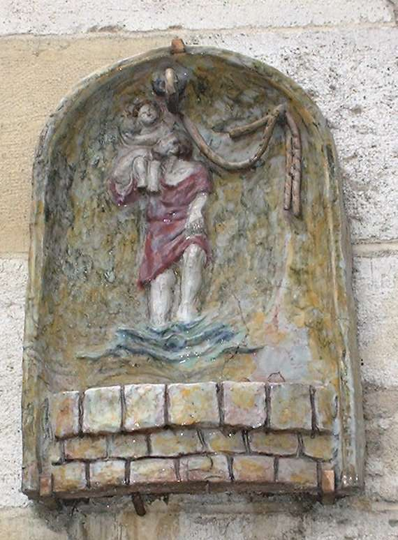 Date : 19 octobre 2004, vers 11 h 30 Source : photo personnelle d'archeos Description : en bas-relief représentant saint Christophe portant Jésus-Christ enfant sur ses épaules ; situé à l'angle de la rue du Puits-Saint-Christophe et du Quai Cypierre (sur une agence GAN) à Orléans. Licence